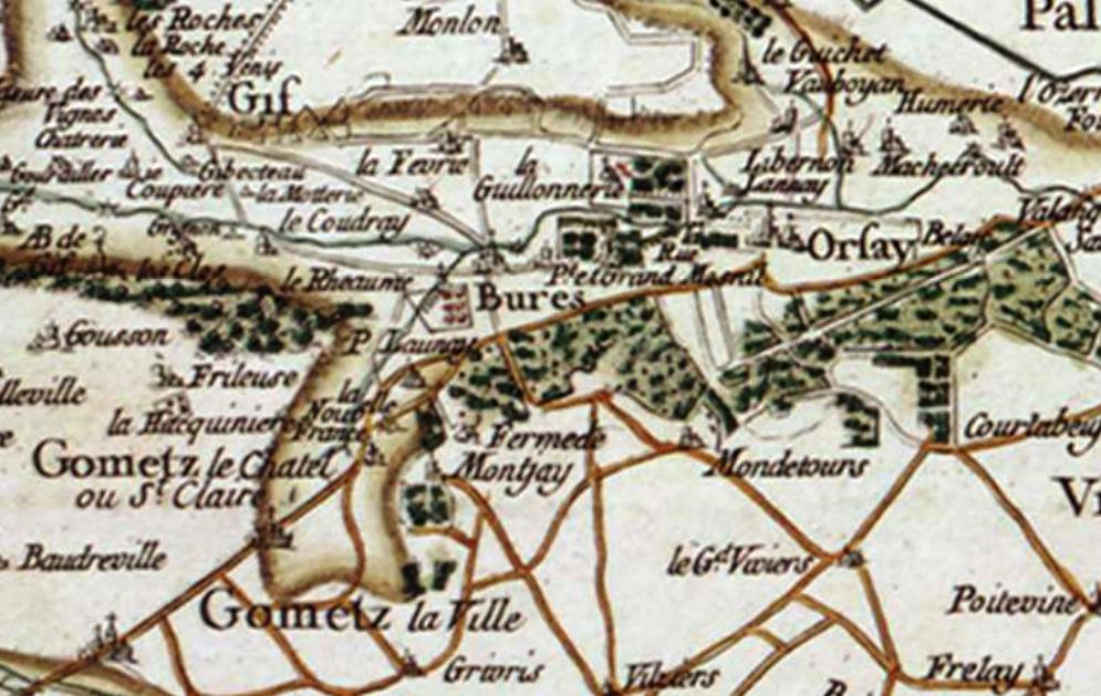 Carte de la région de Bures-sur-Yvette (91) au XVIIe siècle